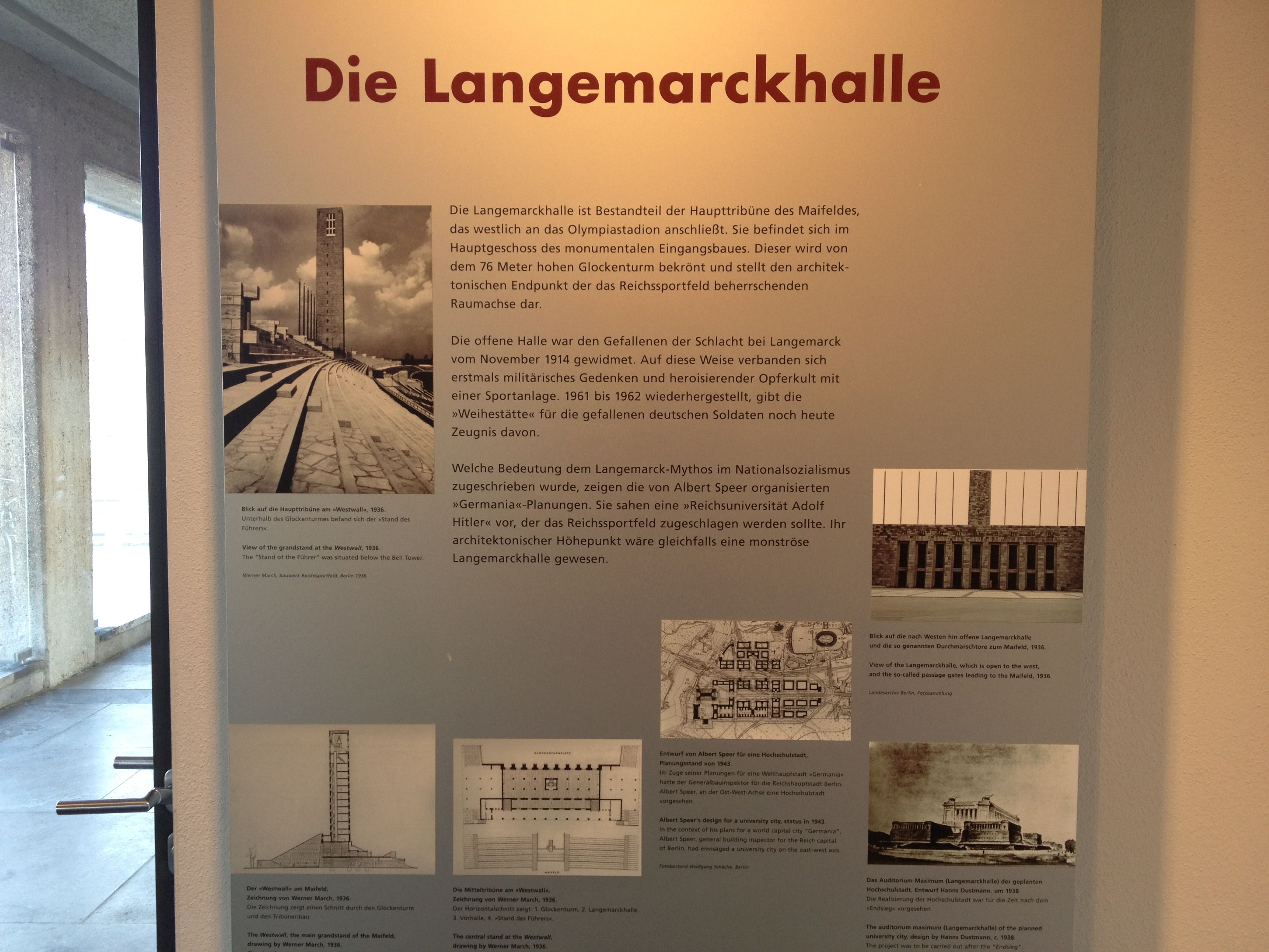 Die Langemarckhalle und deren Beschreibung